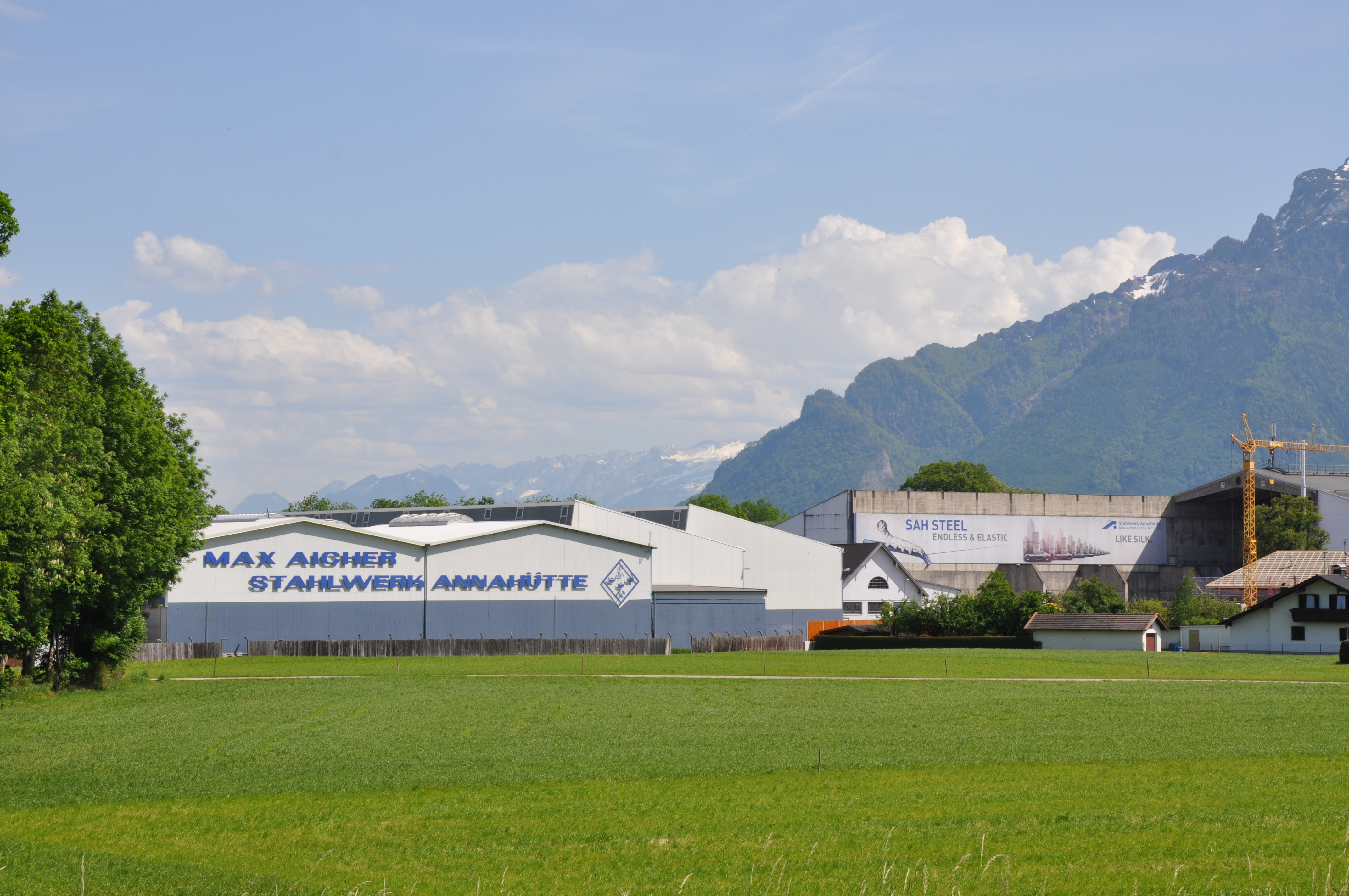 Stahlwerk Annahütte in Hammerau von der B20 aus gesehen